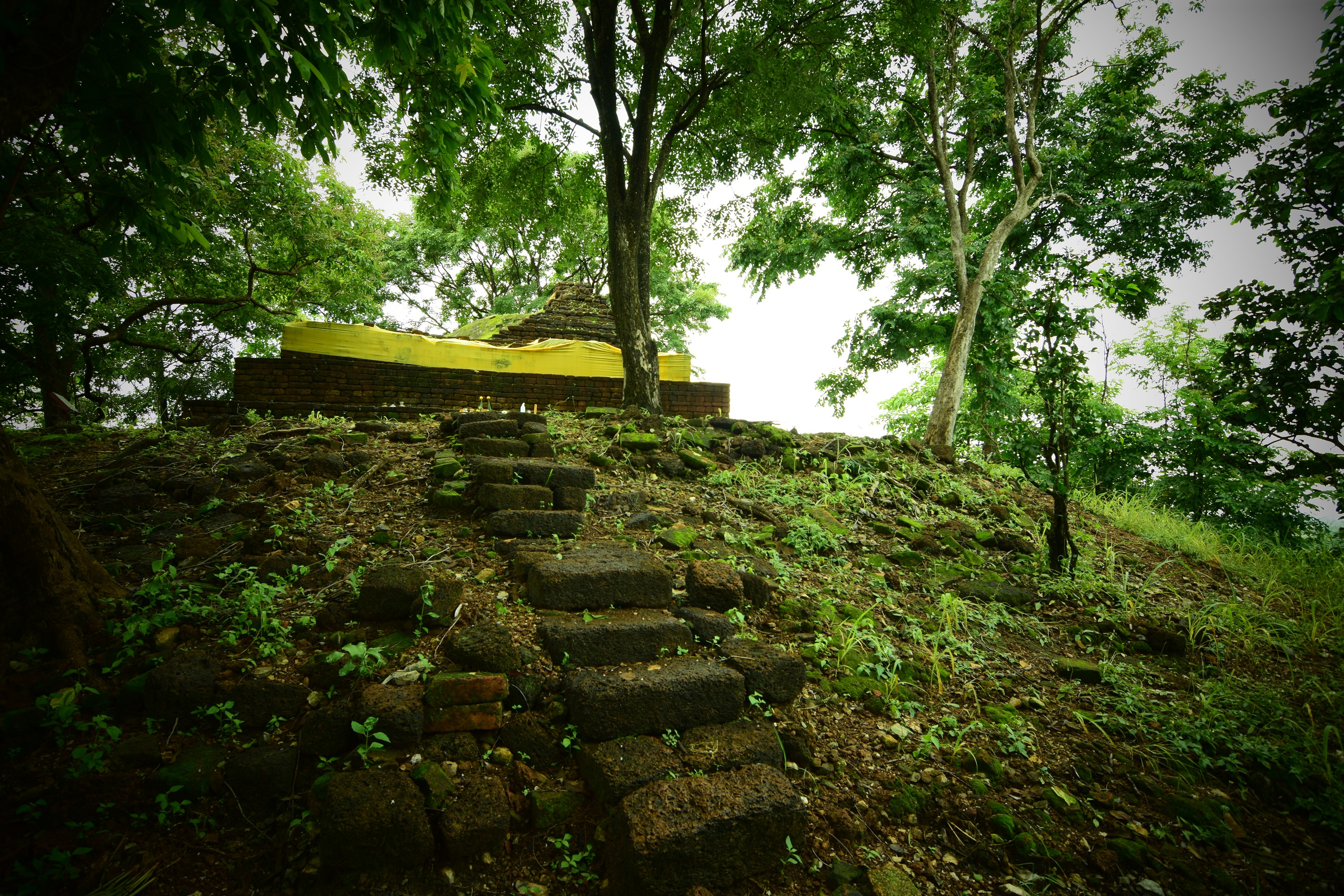 วัดเขานางทอง(ถ้ำนางทอง)